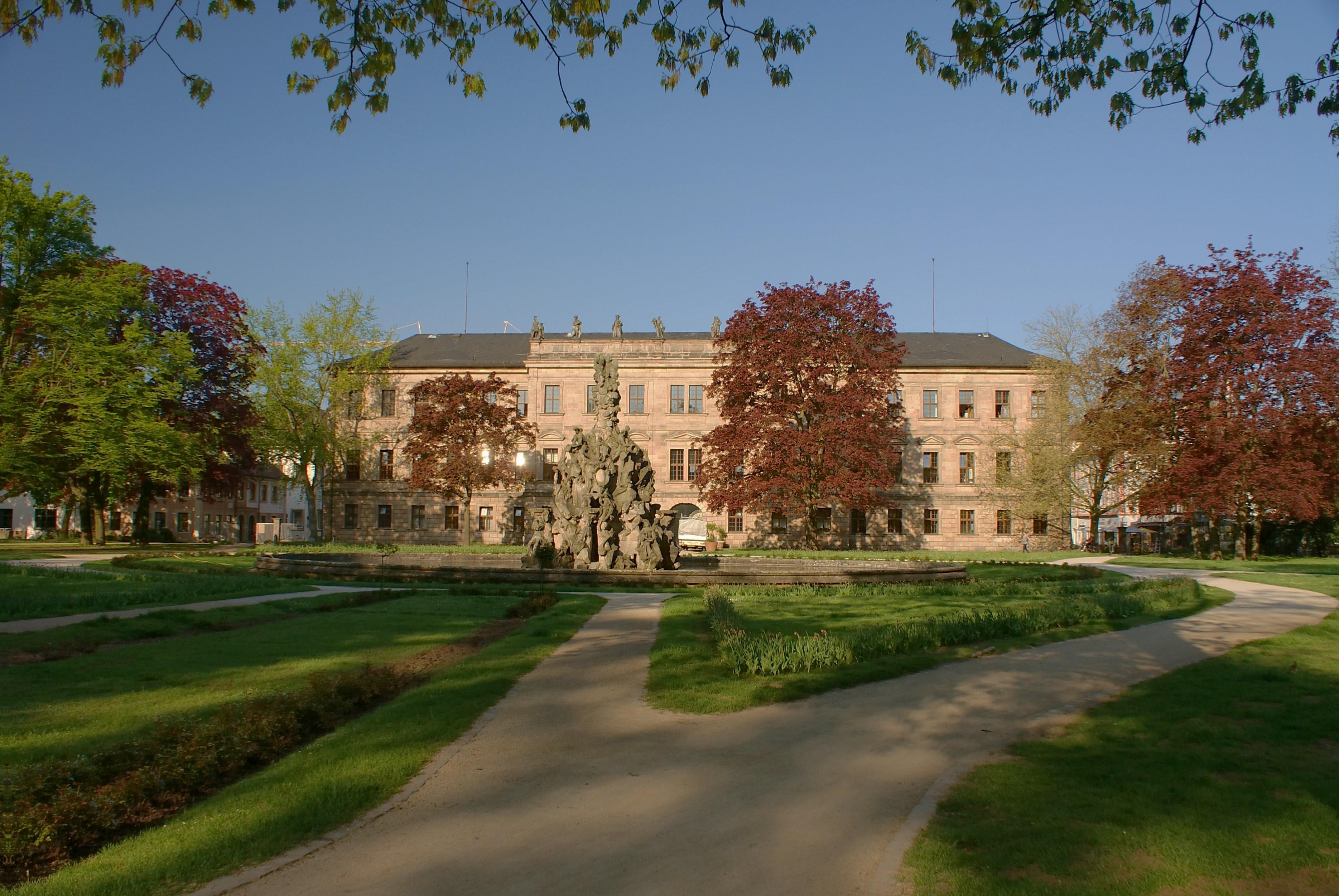 Schloss Erlangen